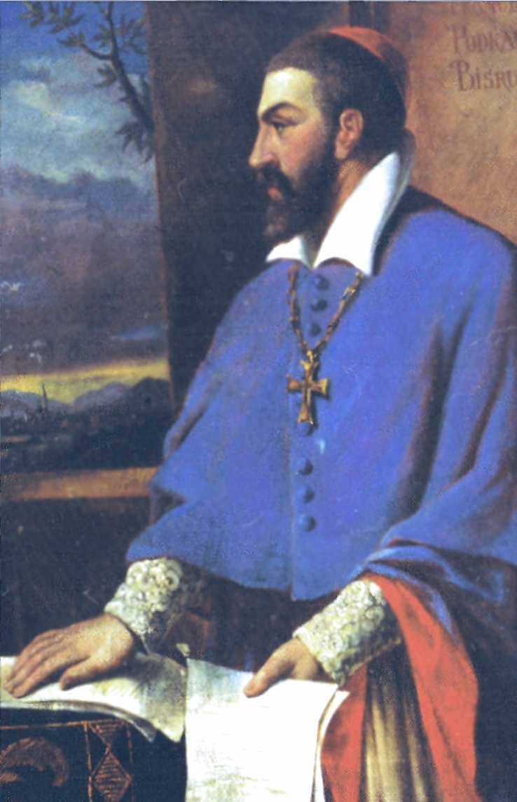 Bishop Franciszek Krasiński